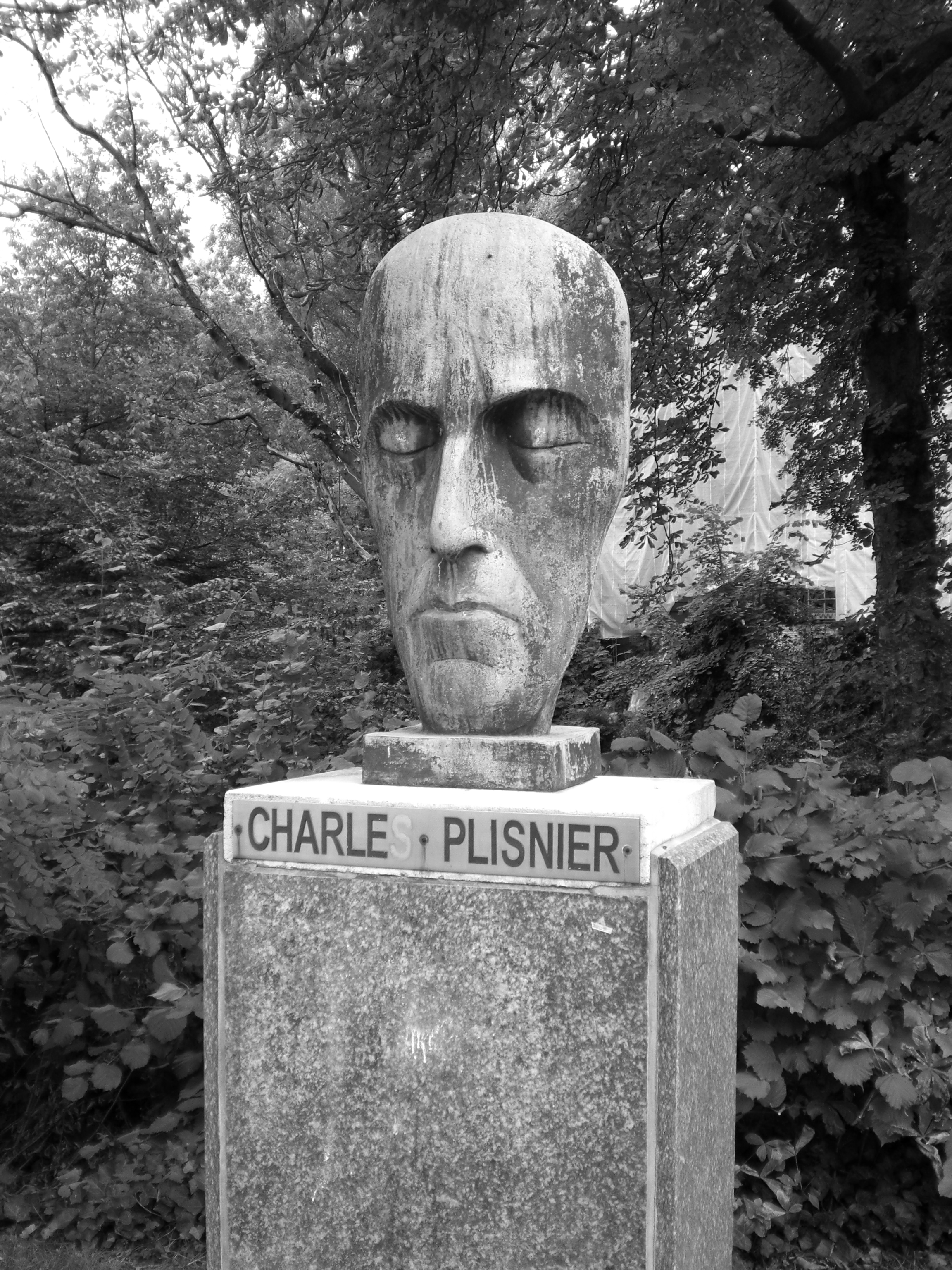 Sculpture de Charles Plisnier en le Parc Pierres Paulus en Saint-Gilles.